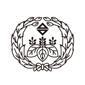 中文（台灣）: 臺灣總督府鐵道部職員徽章(昭和時期)